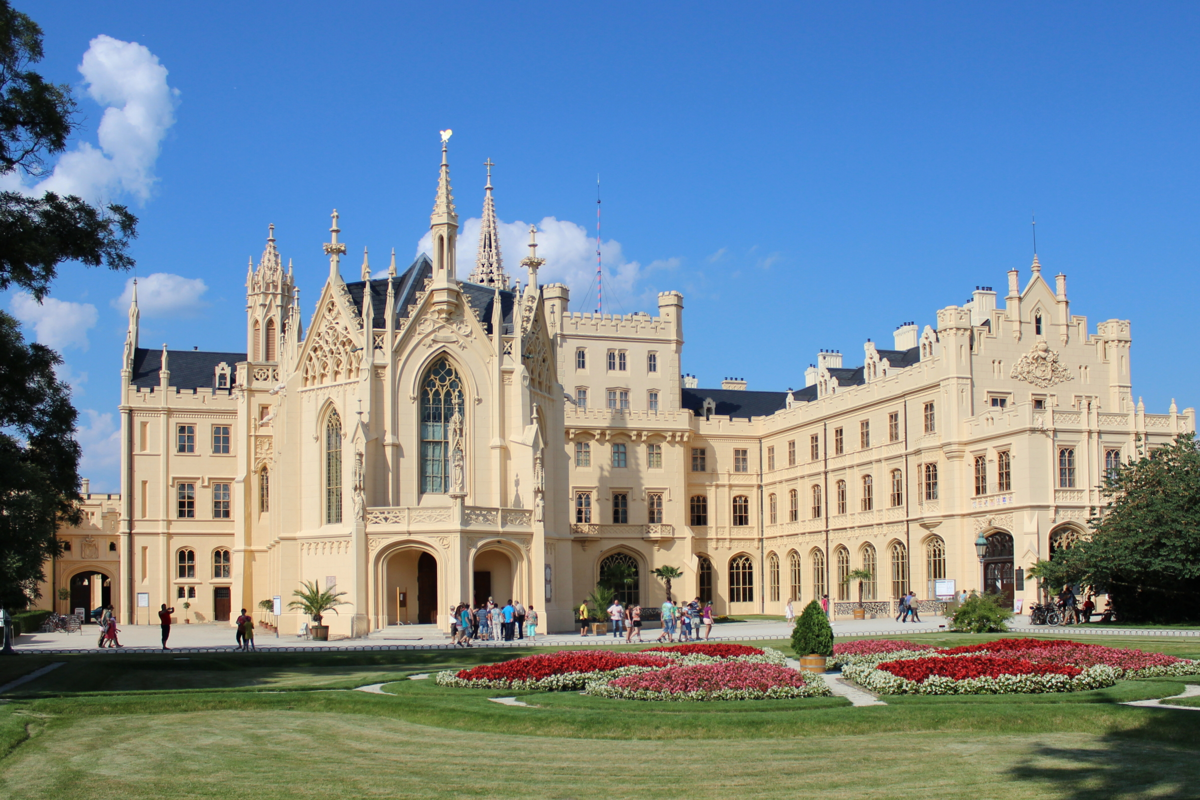 Zámek Lednice, Zámek 1, 2, Zámecké náměstí 67, Park 433, Lednice (okres Břeclav).